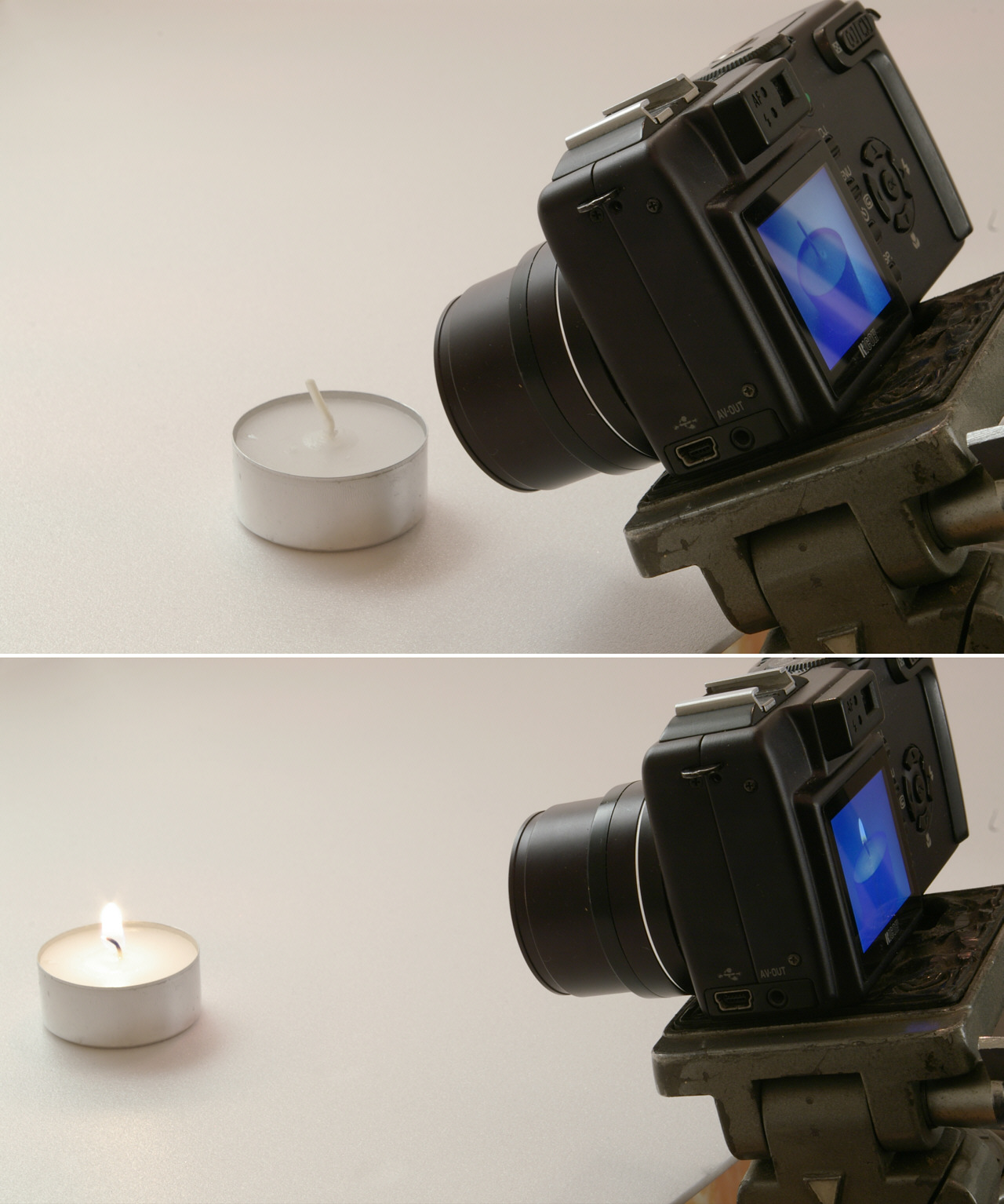 Arbeitsabstand für etwa gleichen Abbildungsmaßstab bei 28 mm und bei 85 mm Brennweite (Kleinbild-Äquivalent)